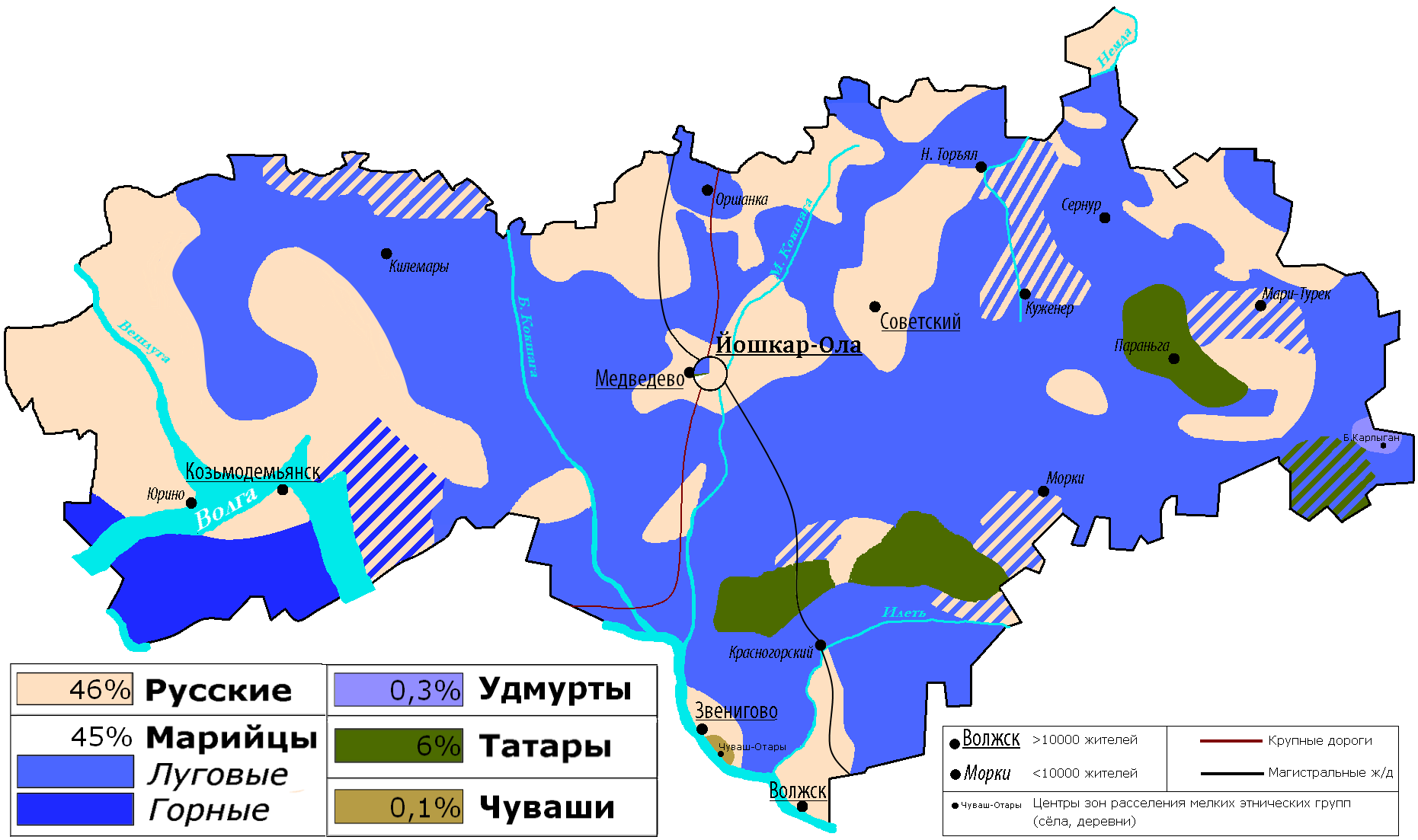 Расселение национальностей в Марий Эл